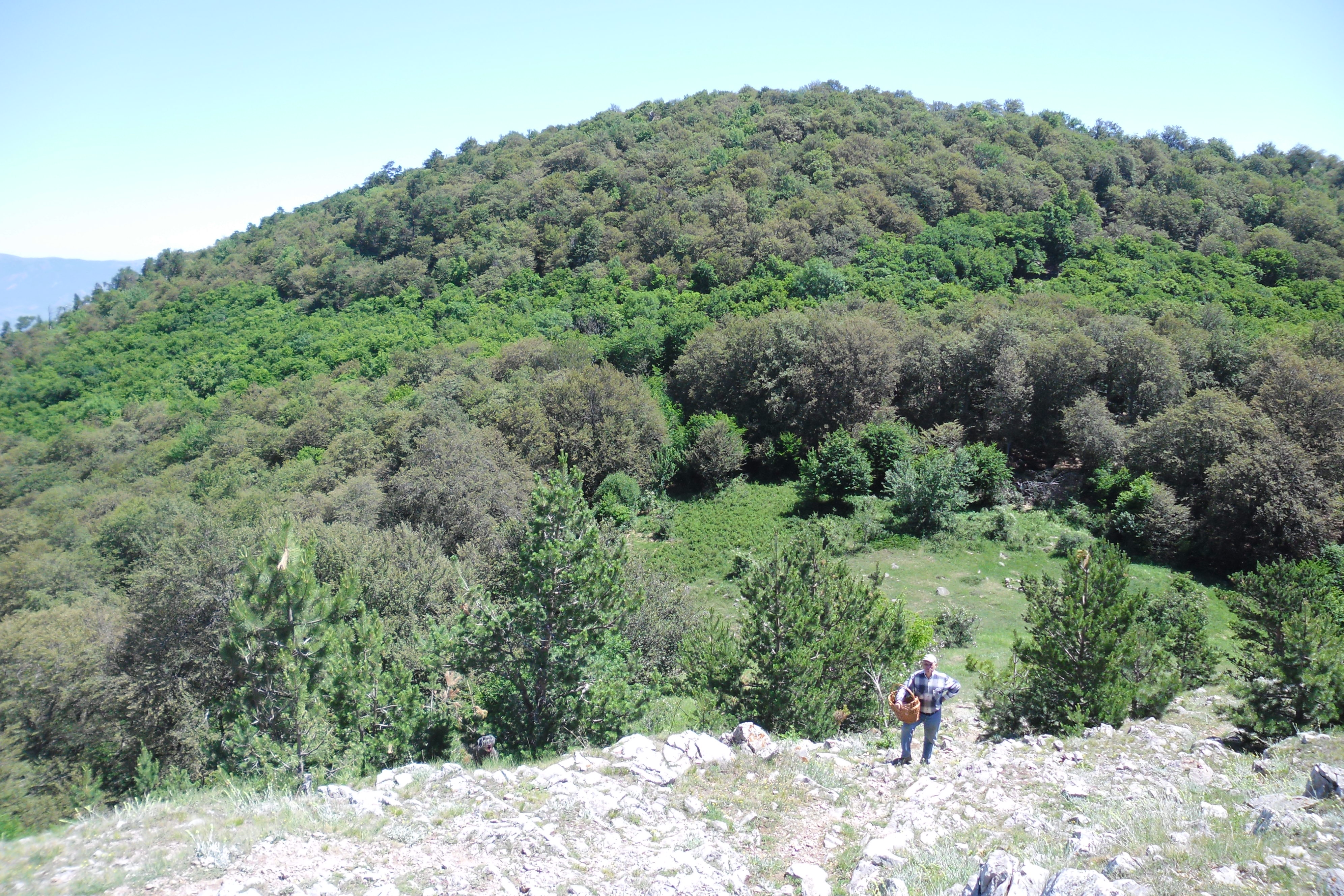 Дипло: Фото